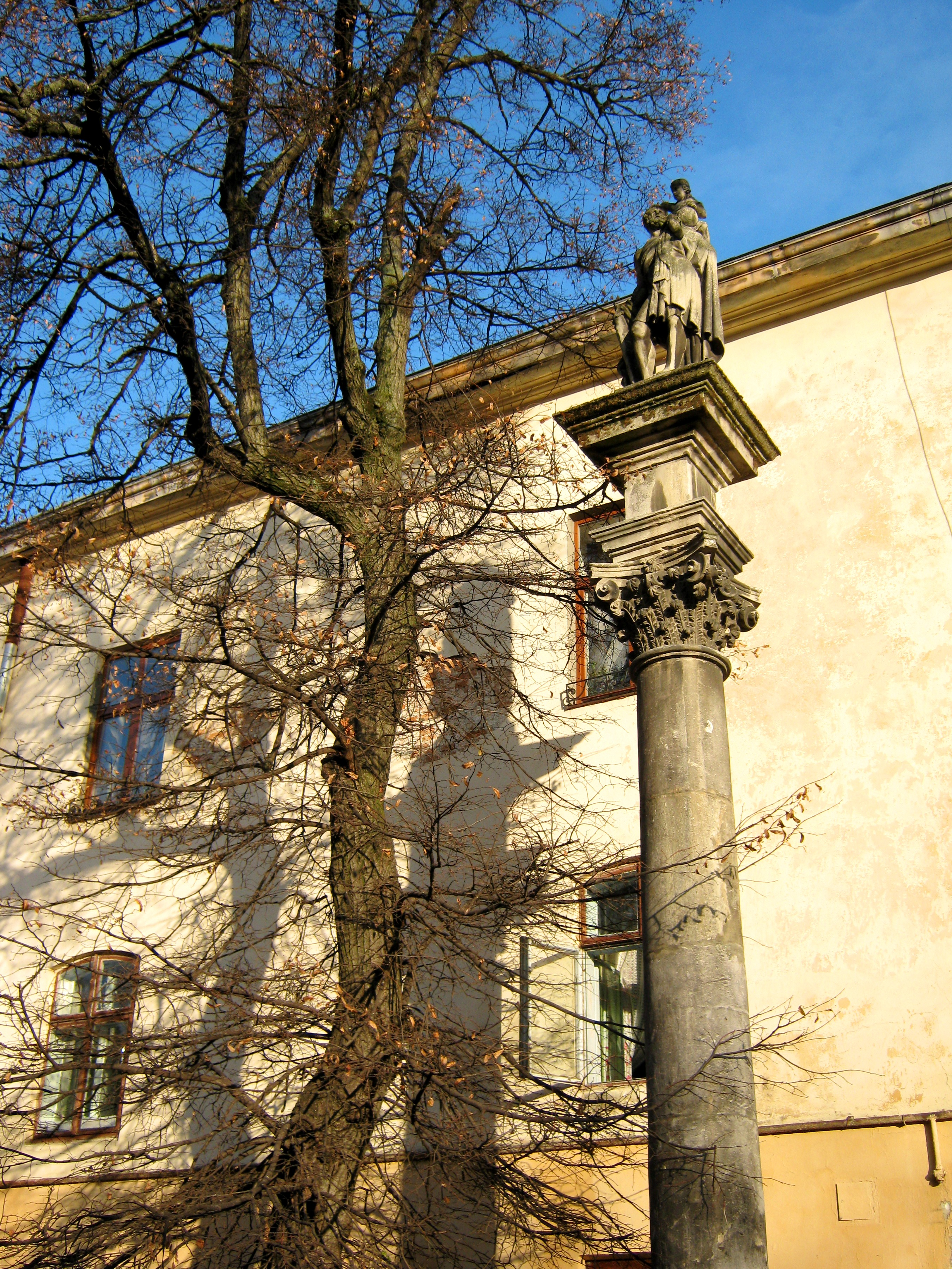 Вірменський собор - Колона Св. Христофора Львів Вірменська, 7/9. Скульптор: Христіан Сейнер (Chrystian Seyner)